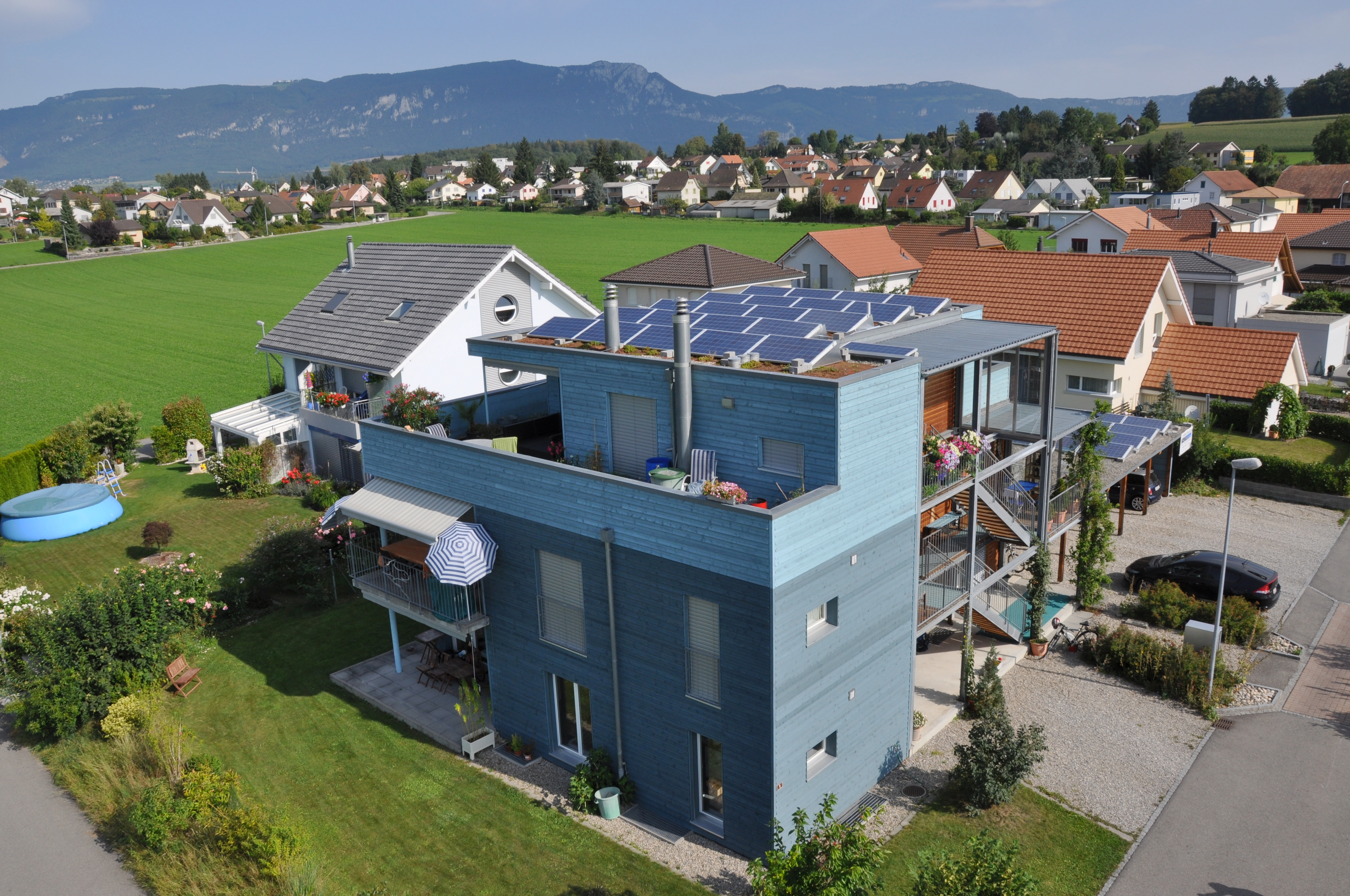 Minergiehaus von ch-info.ch, neu ab 15.8. mit 10-kW-Solaranlage der ersap, Besichtigungen möglich, infos